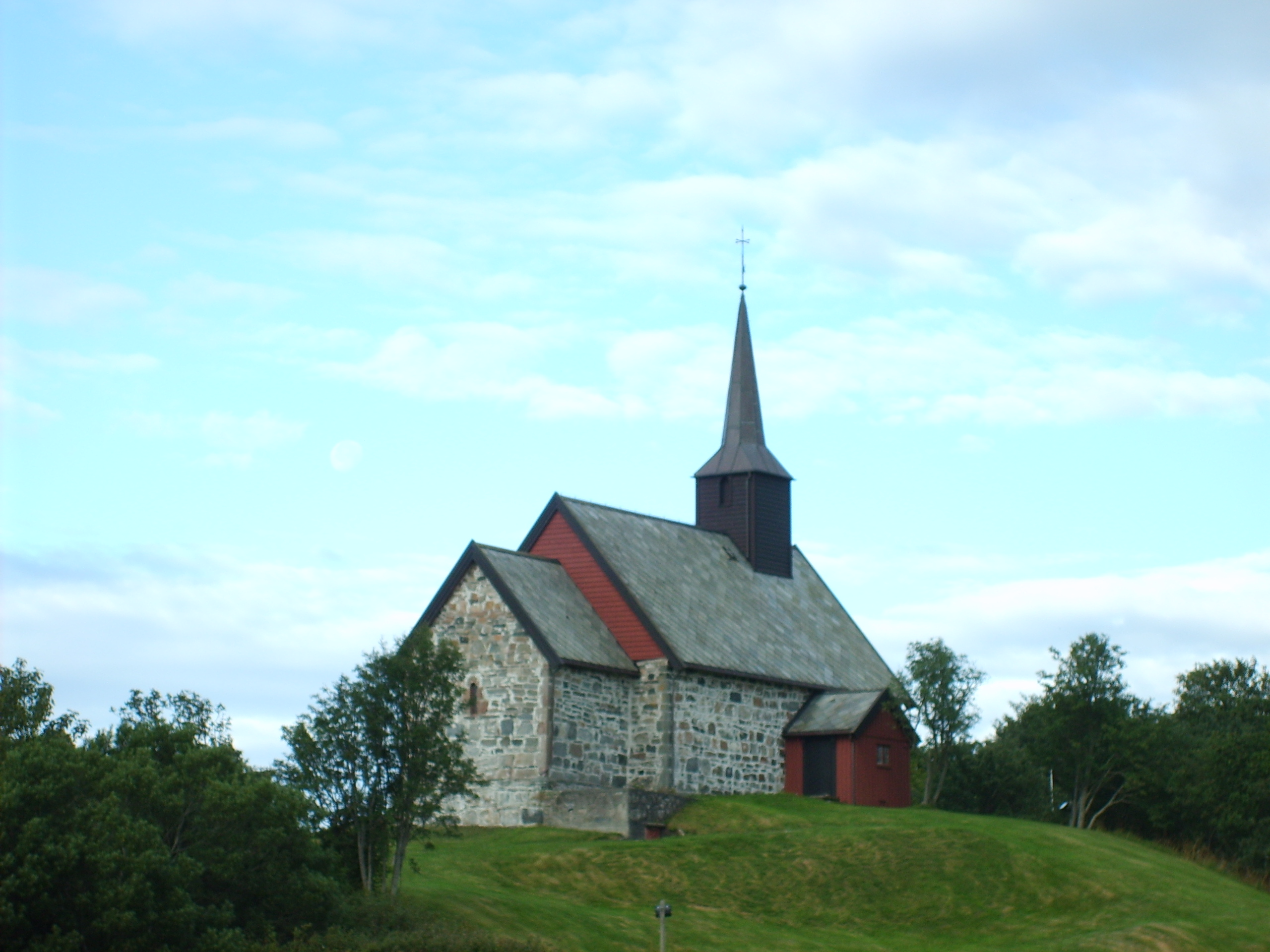 Edøy gamle kyrkje på Edøya i Smøla kommune på Nordmøre.